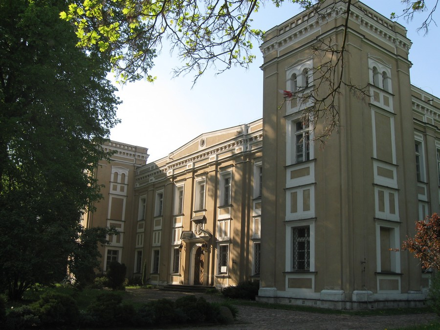 Trzebiny, pałac